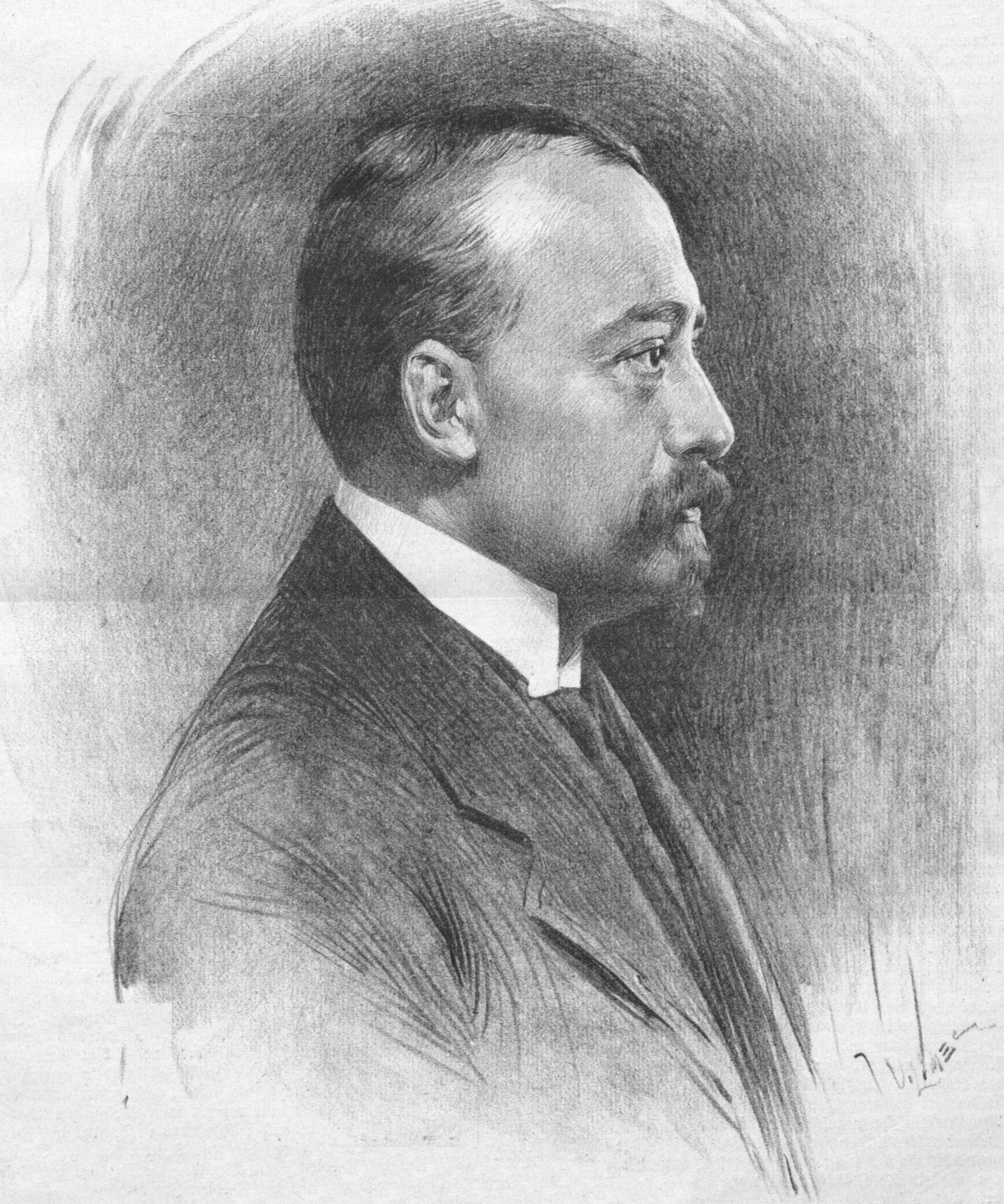 Karl Freiherr von Škoda (1878-1929), Austrian inventor and entrepreneur